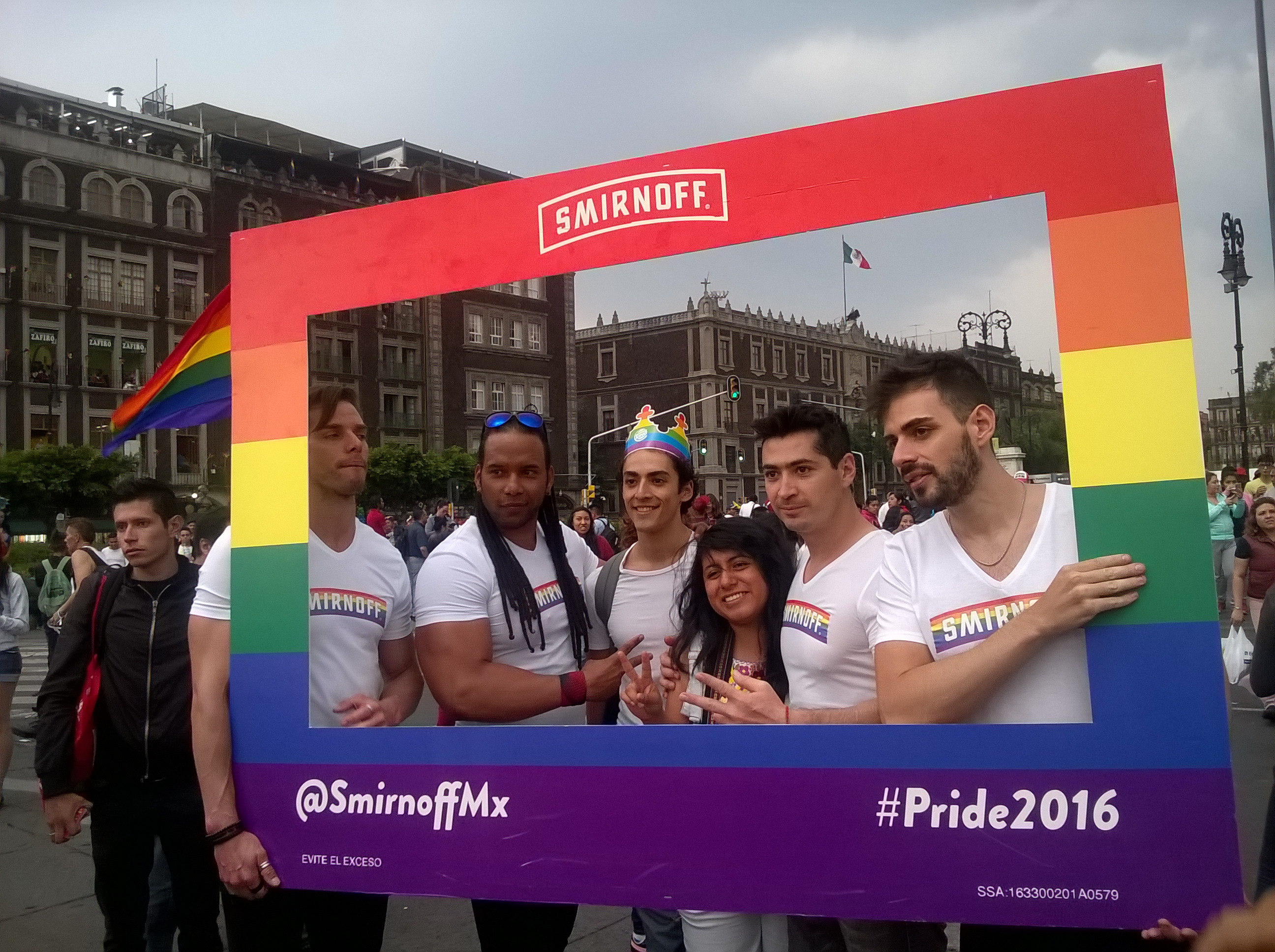 Marcha del orgullo LGBT 2016 en la Ciudad de México